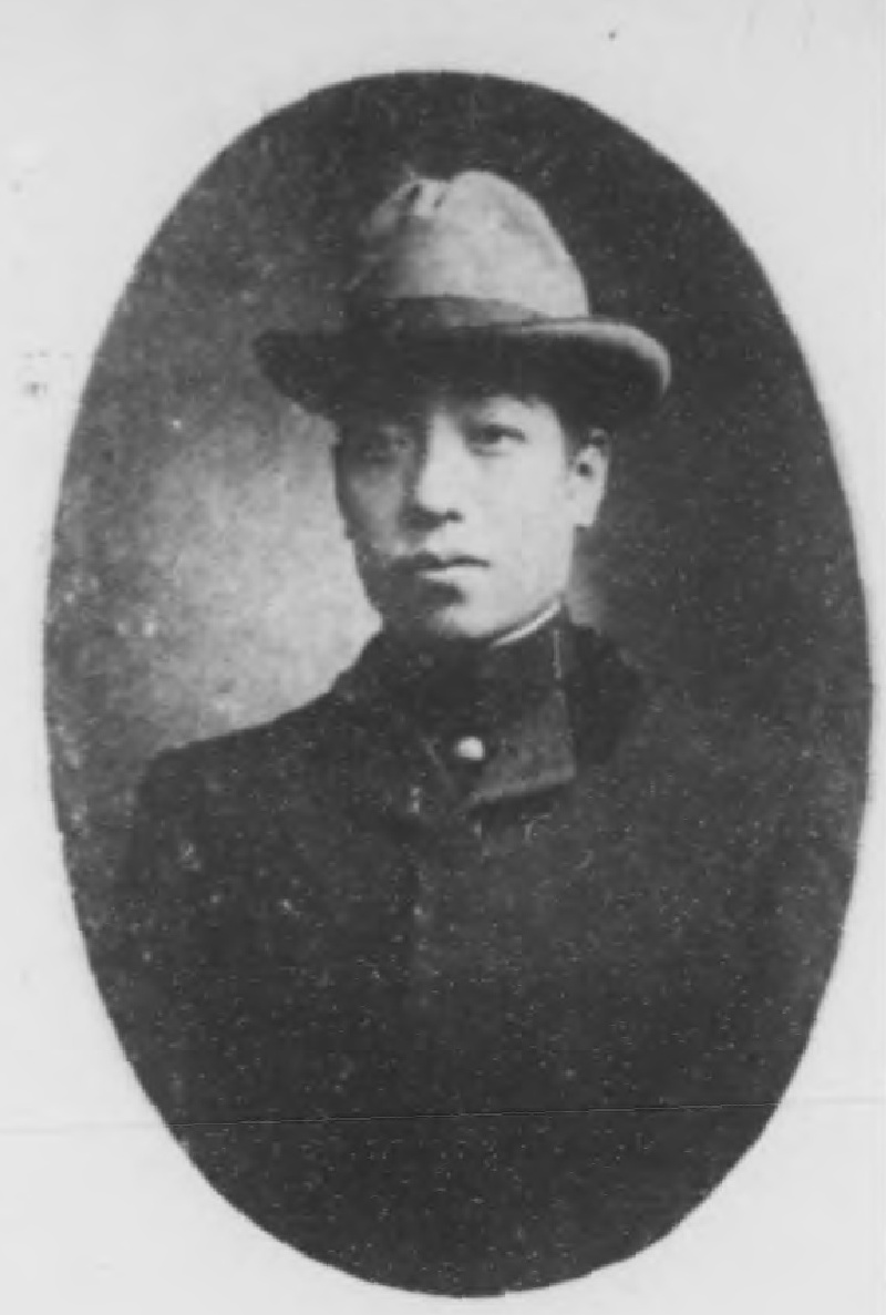 光緒甲辰科進士小像